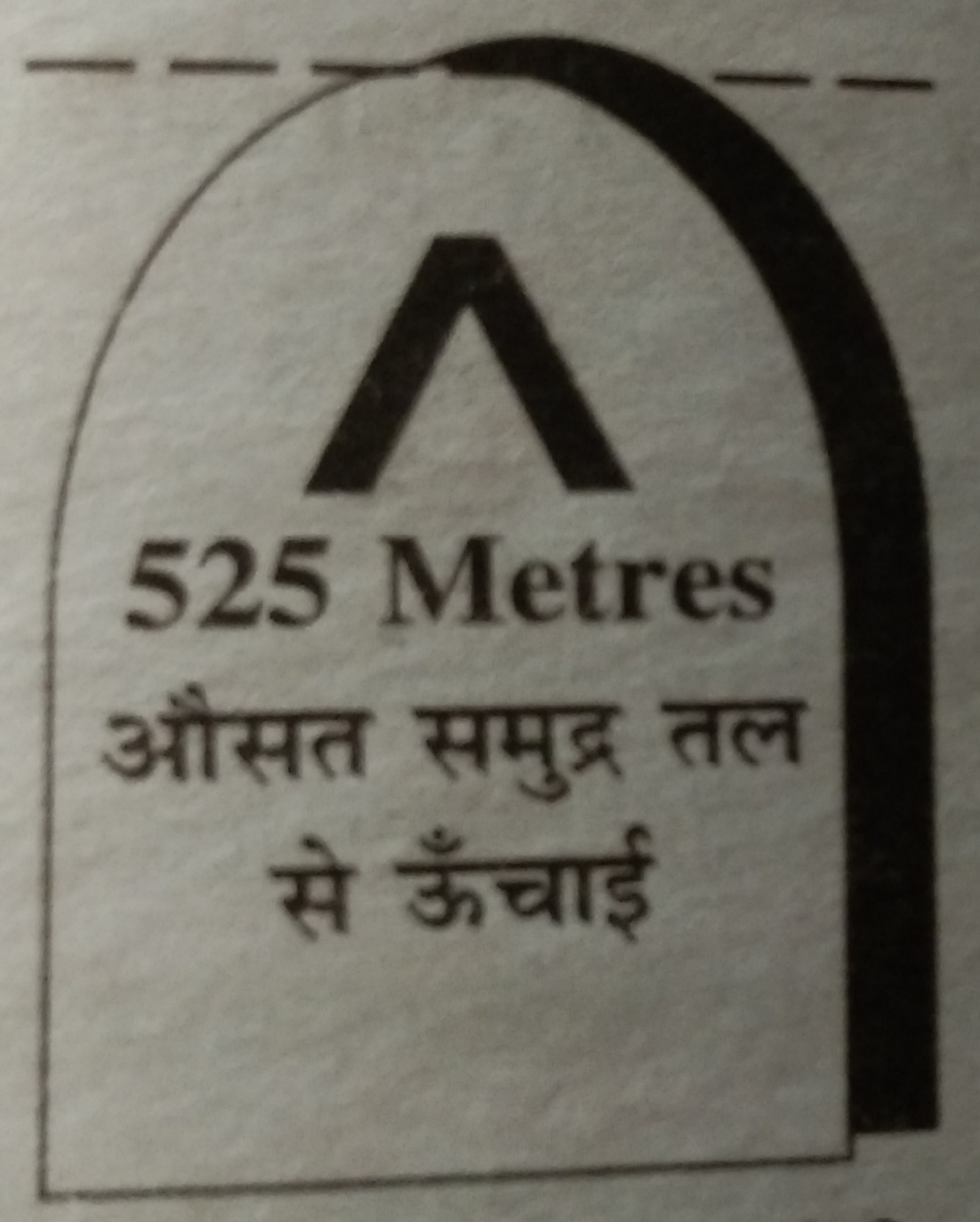 तल चिन्ह विधि उच्चावच दर्शाने की